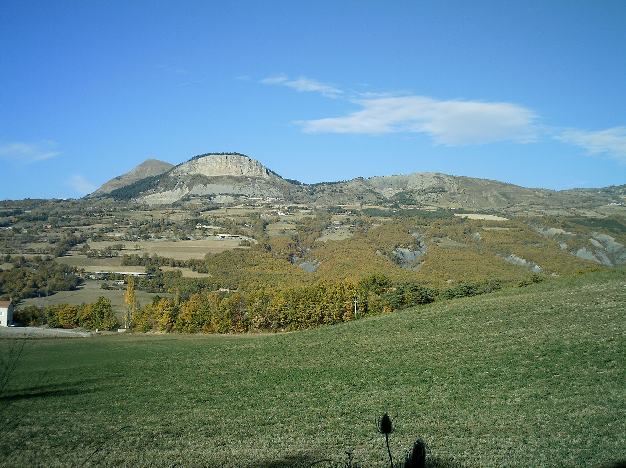 Vue sur la commune de La Rochette( Hautes-Alpes). Au fond le Chapeau de Napoléon(1425m) et le Puy de Manse(1646m).